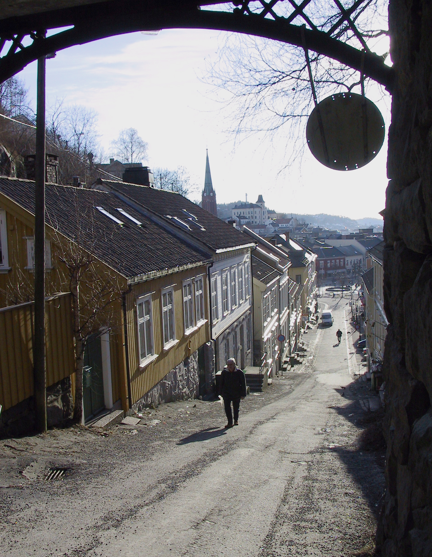 Arendal Bendiksklev